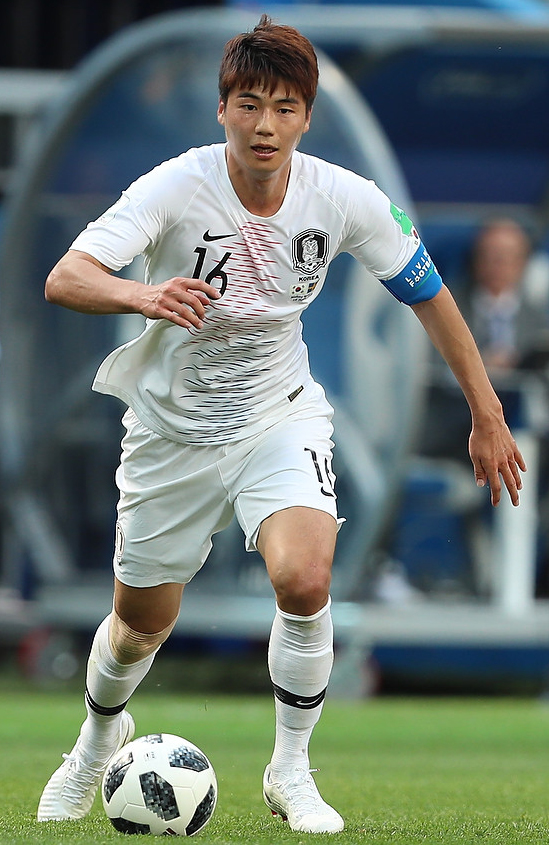 Швеция победила Южную Корею в матче ЧМ-2018